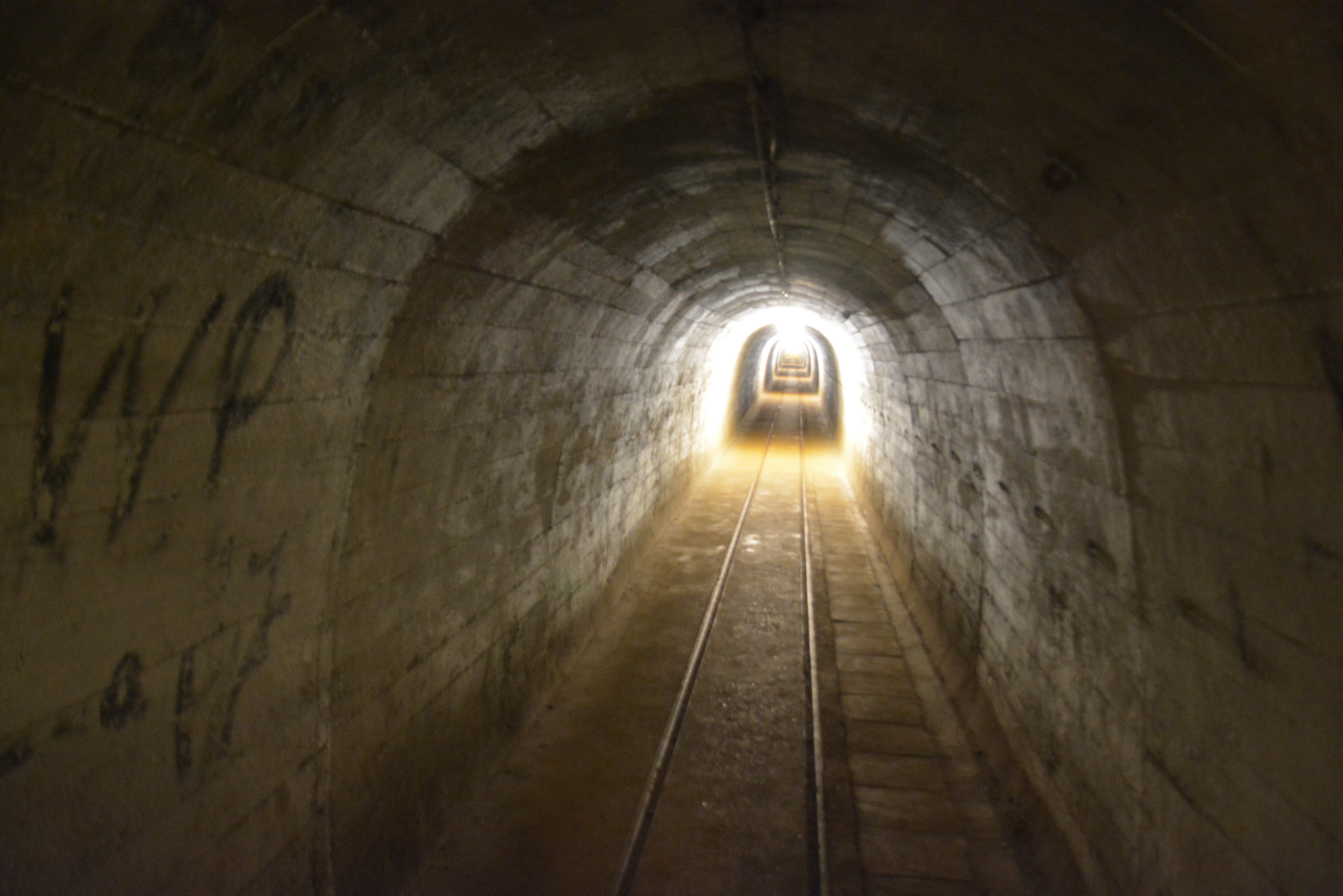 MRU - Muzeum Fortyfikacji i Nietoperzy w Pniewie